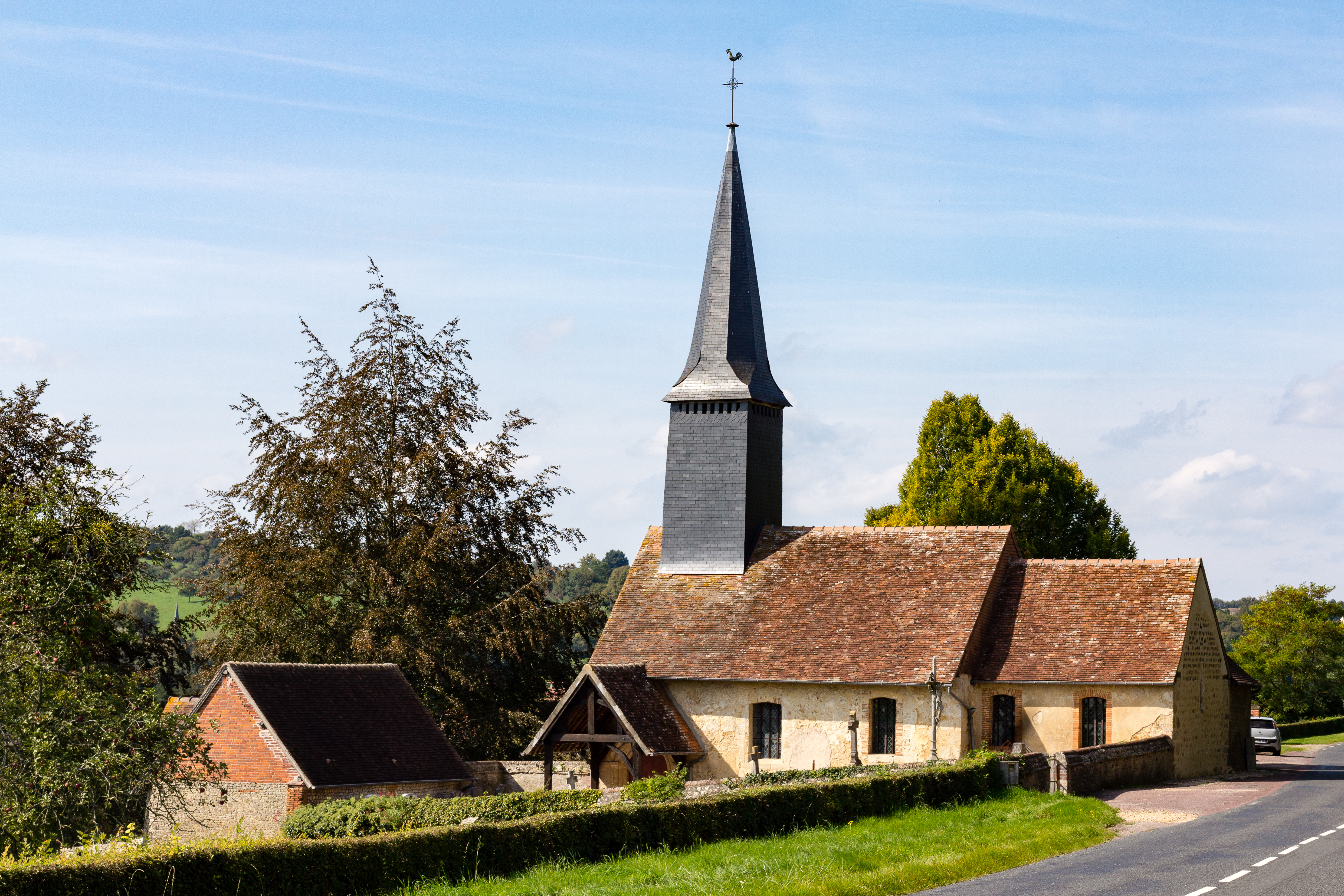 Église Saint-Jean de Saint-Jean-de-Livet (France).